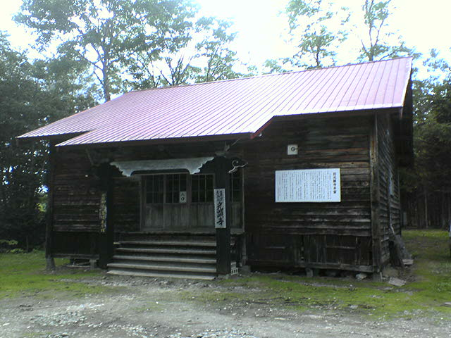 KOKEN-JI Buddhist Temple, Shumarinai Hokkaido Japan.